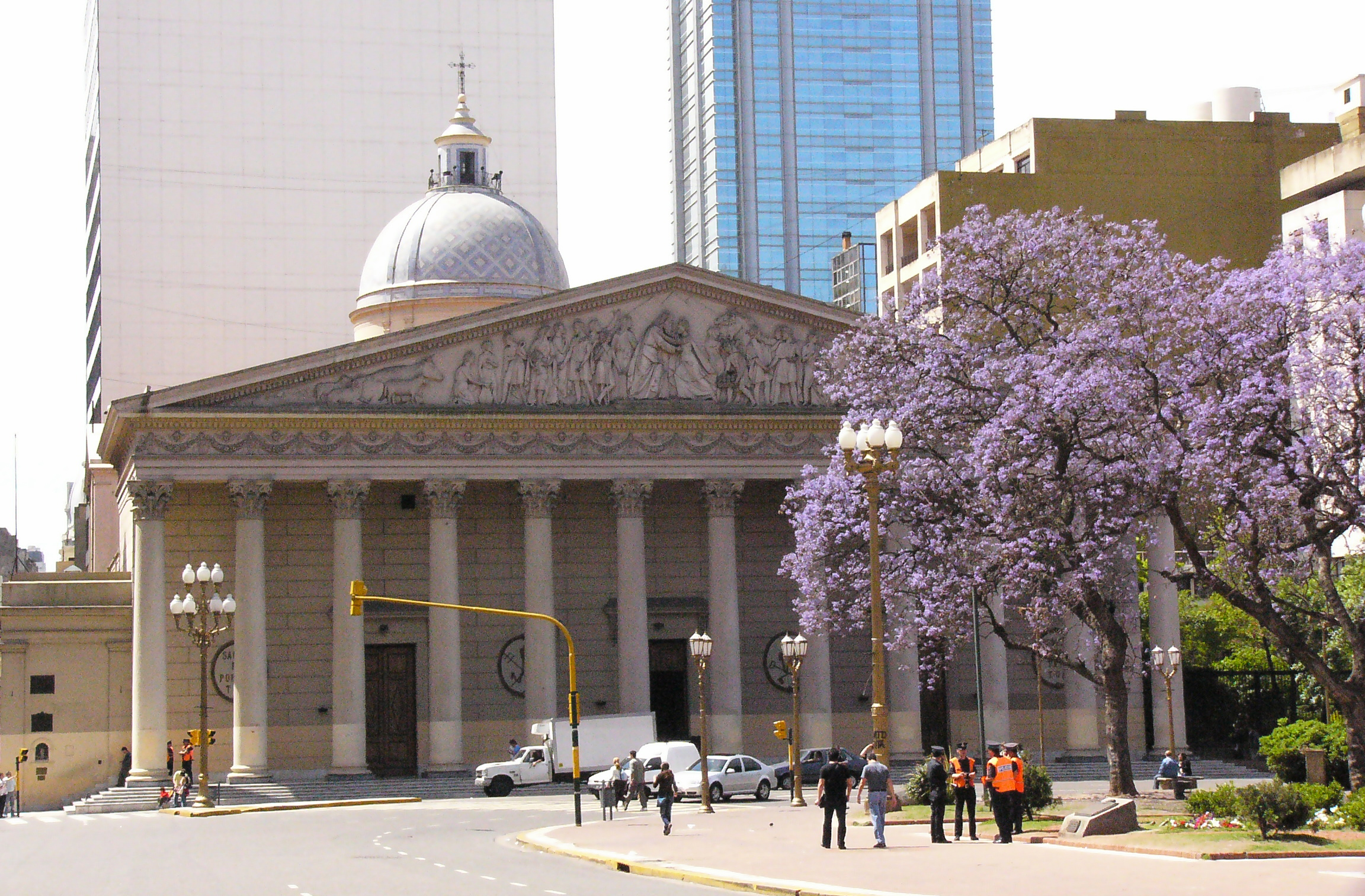 Façade of Buenos Aires Cathedral